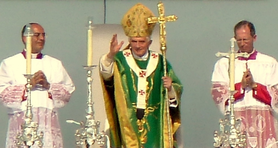 Benedikt XVI. an der päpstlichen Heiligen Messe in Freiburg, anlässlich seiner dritten apostolischer Heimatsreise in Deutschland.